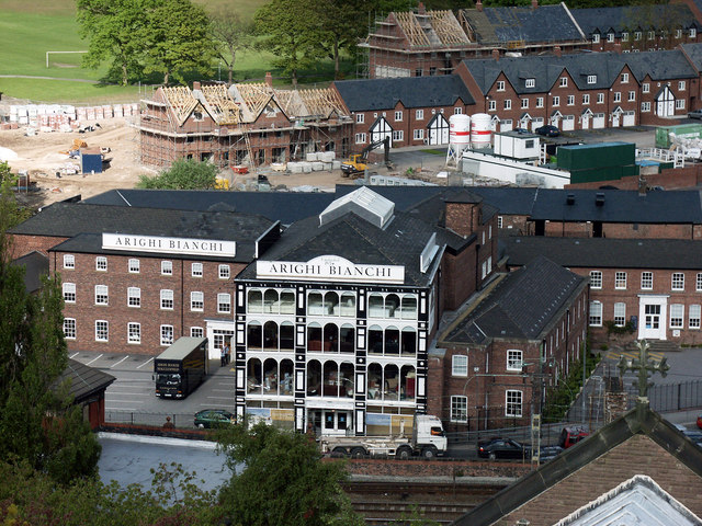 Arighi Bianchi Store